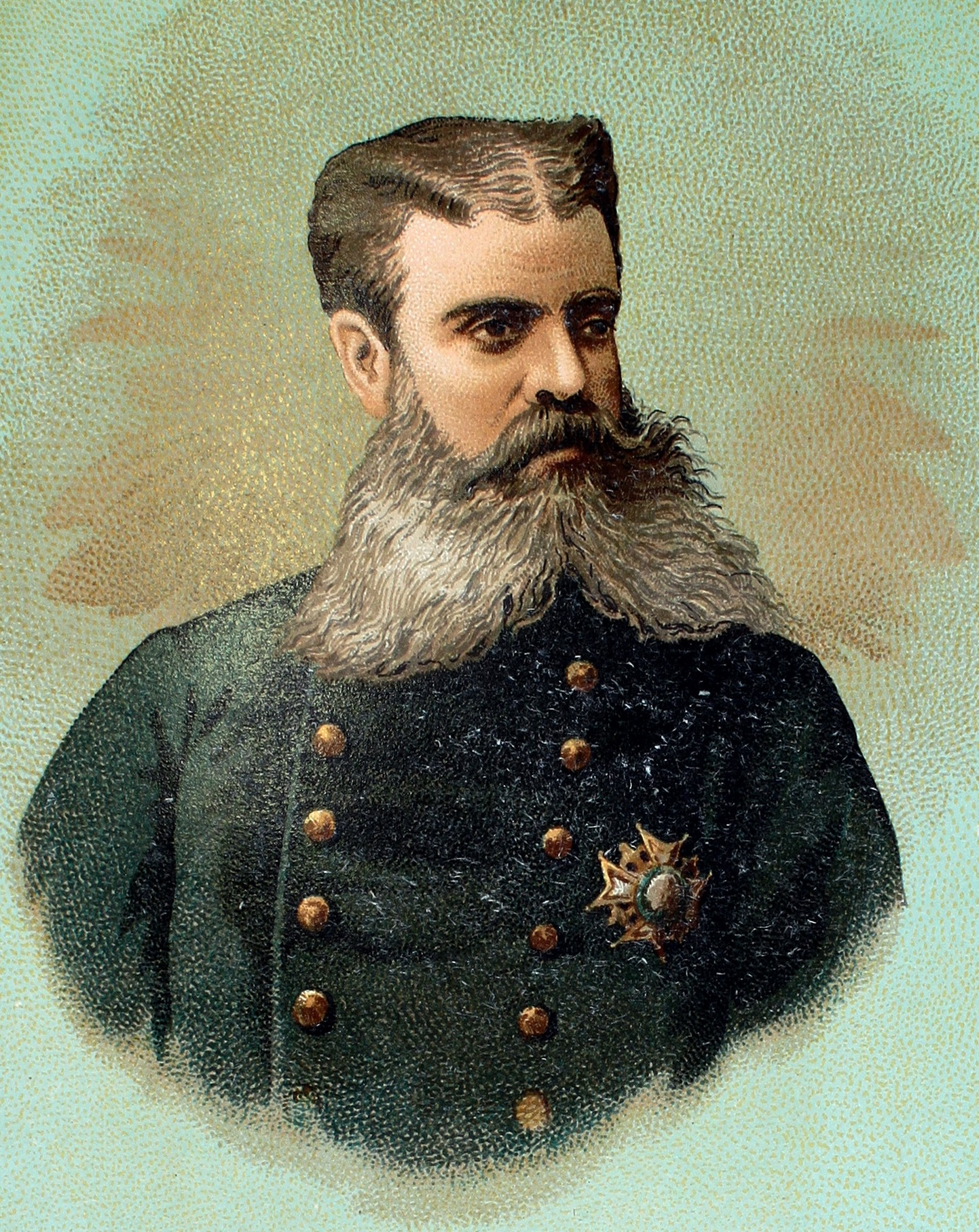 "Antonio Dorregaray". Ilustraciones de la obra : Historia contemporánea. Segunda parte de la Guerra Civil : anales desde 1843 hasta el fallecimiento de don Alfonso XII / por Antonio Pirala. - Madrid : Felipe González Rojas, 1893-1895